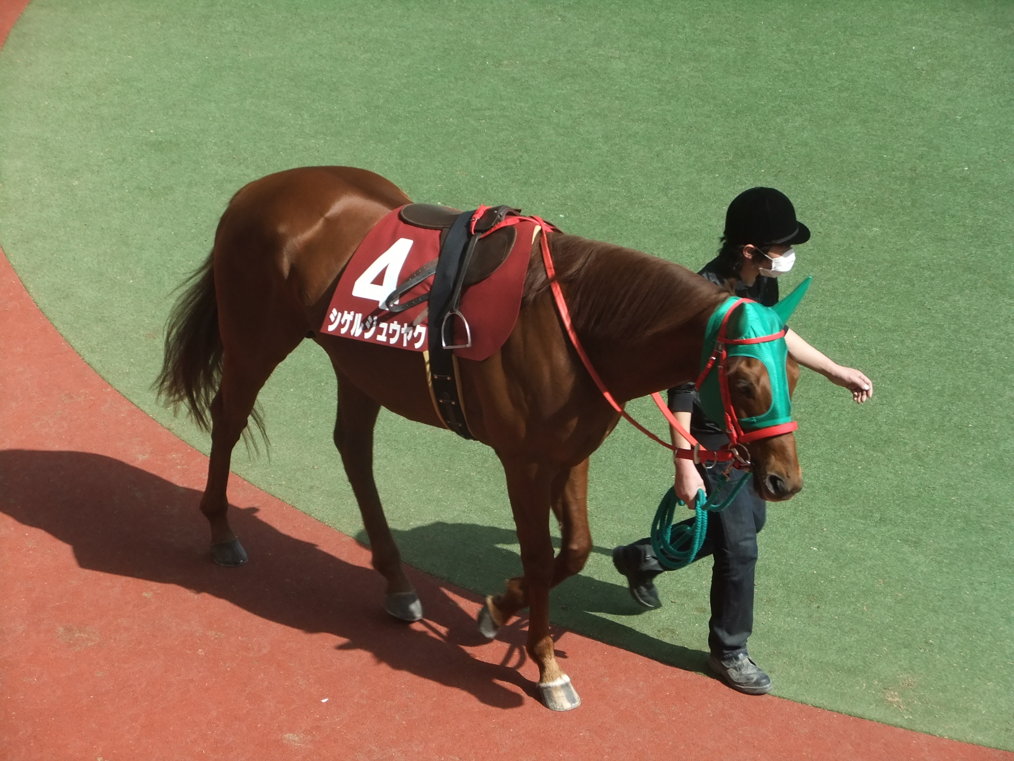 シゲルジュウヤク 2013年3月9日 阪神競馬場